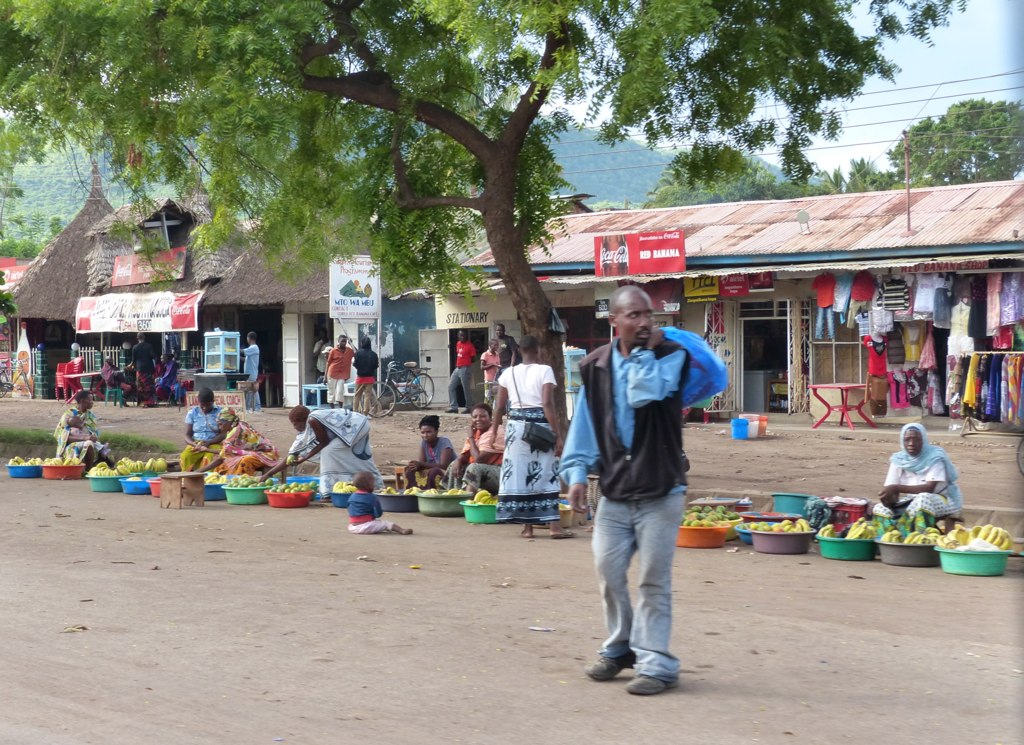 Mto wa Mbu (Tanzania) main street